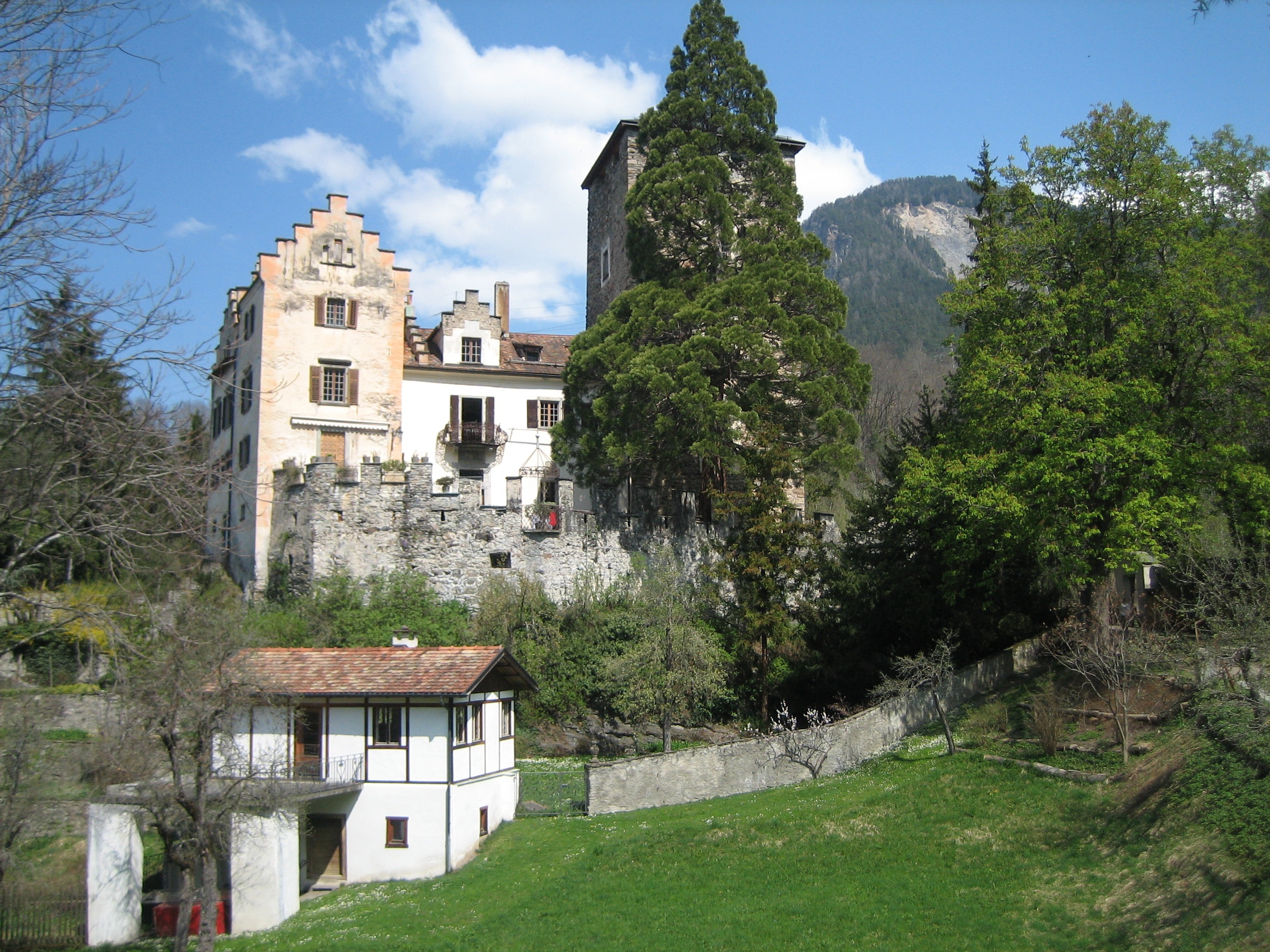 Schloss Baldenstein, Ansicht von Süden